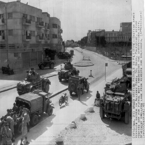 1945 - תל אביב, רחוב אלנבי, פטרולים בריטיים